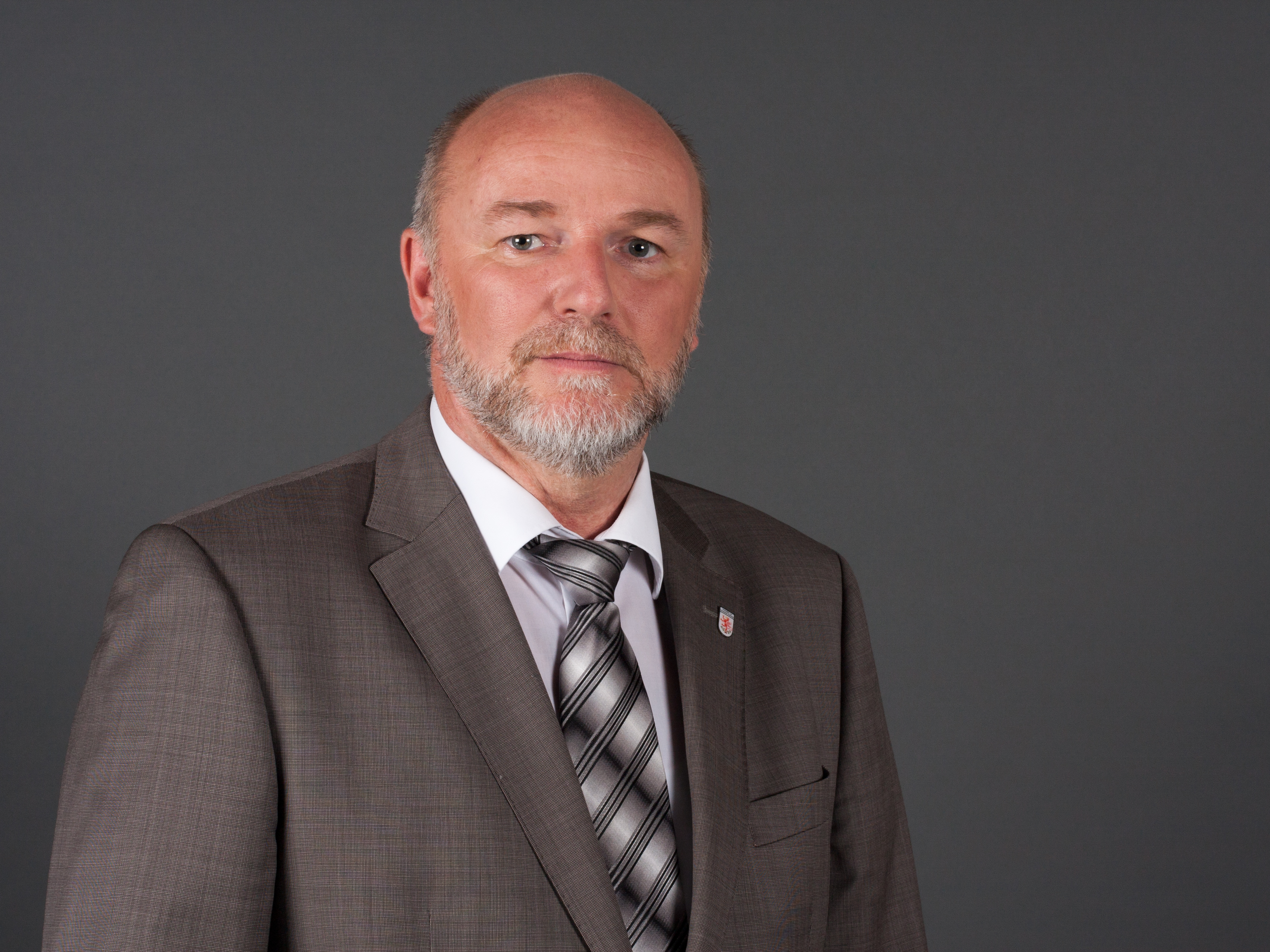 Egbert Liskow, MdL Mecklenburg-Vorpommern, CDU Fraktion